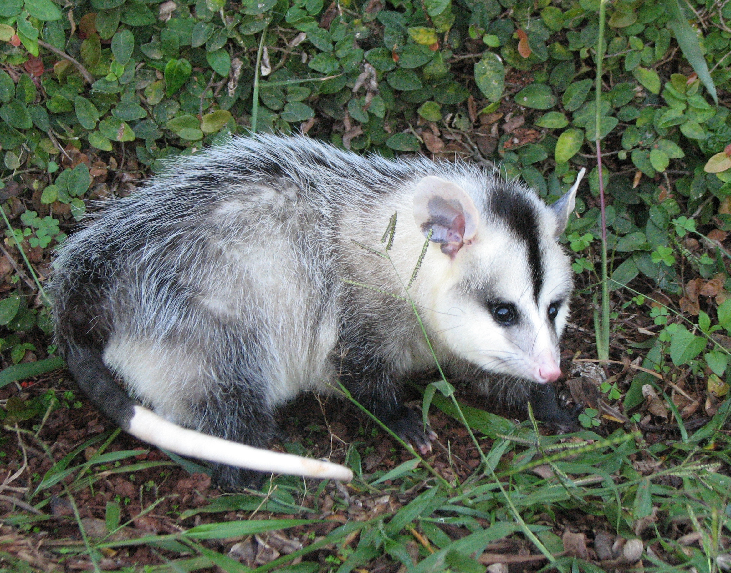 Saruê (Gambá da América do Norte, com pelagem de inverno).